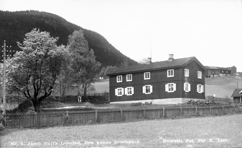 Den gamle prestegården i Øvre Rendal, Bull-museet